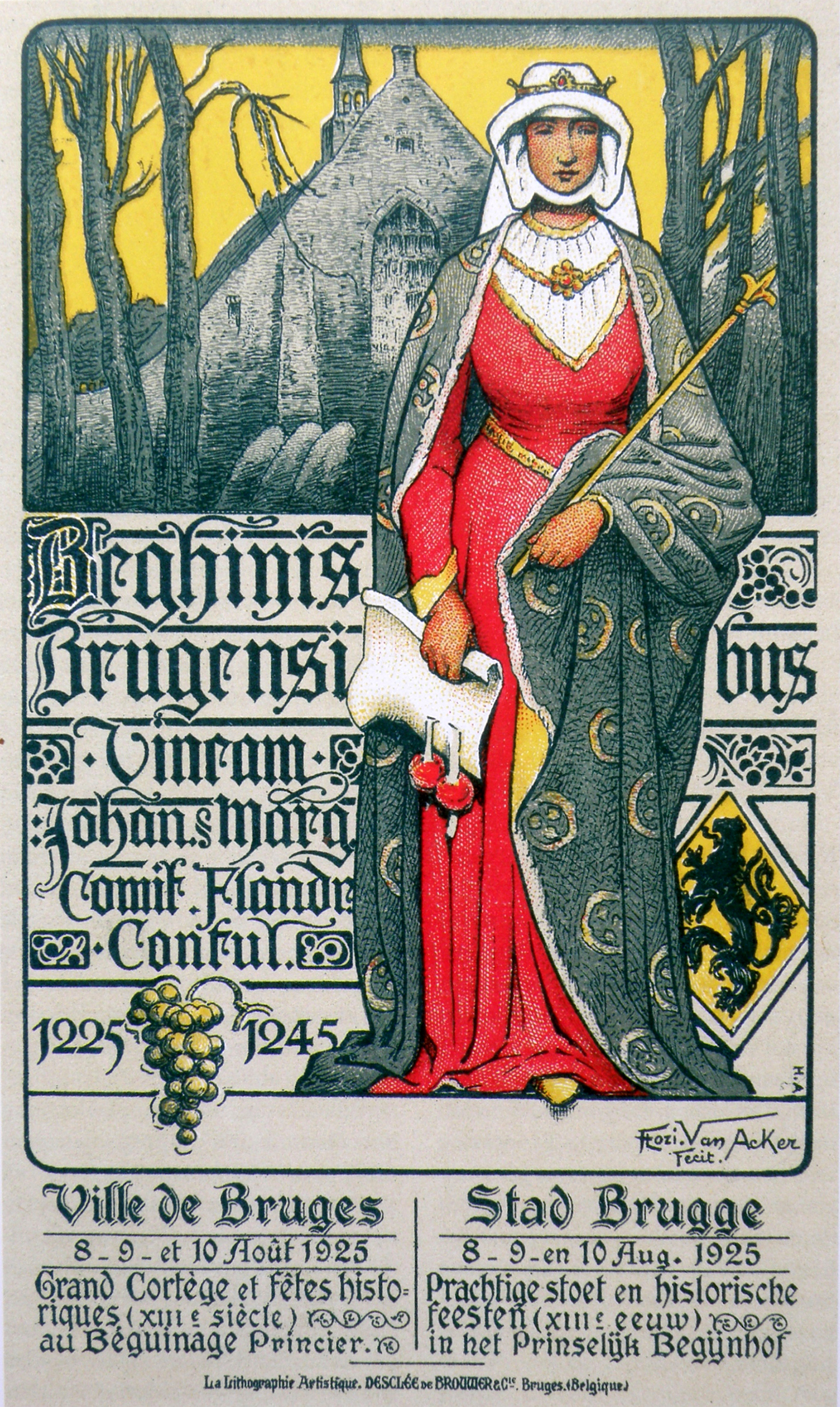 Affiche annonçant la célébration du 7e centenaire du béguinage de Bruges. Oeuvre de Flori Van Acker, 1925.